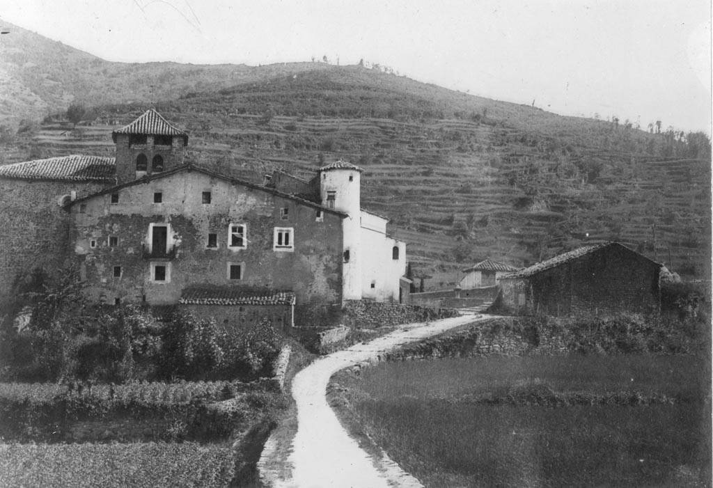 Vista general del Monestir de Santa Maria de Ridaura. Cèsar August Torras i Ferreri (Entre 1890 i 1923)